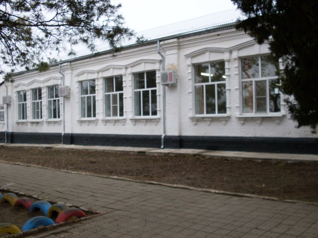 школа33